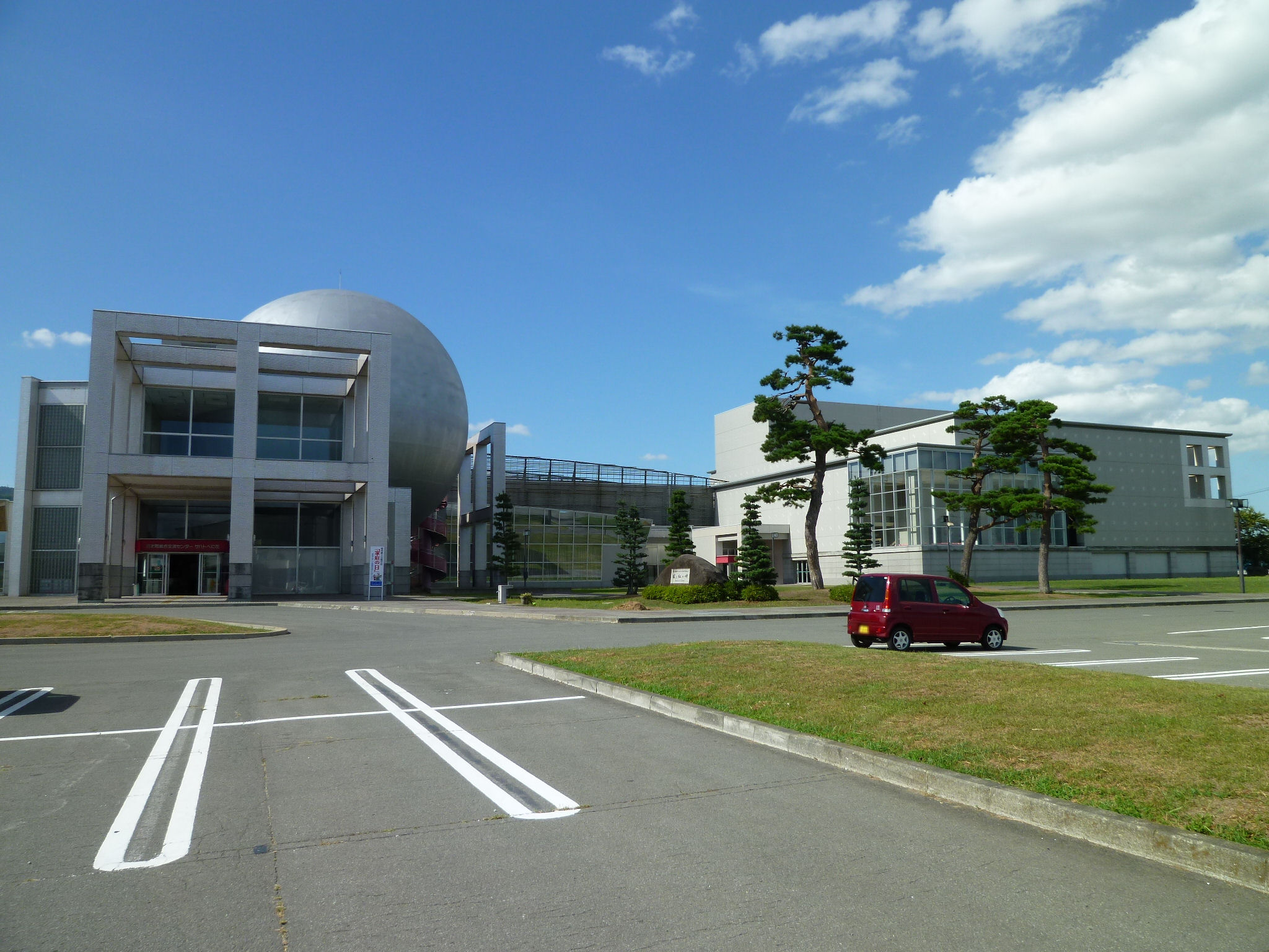 サハトべに花（山形県河北町）。正式名称は河北町総合交流センター。中央公民館を併設。